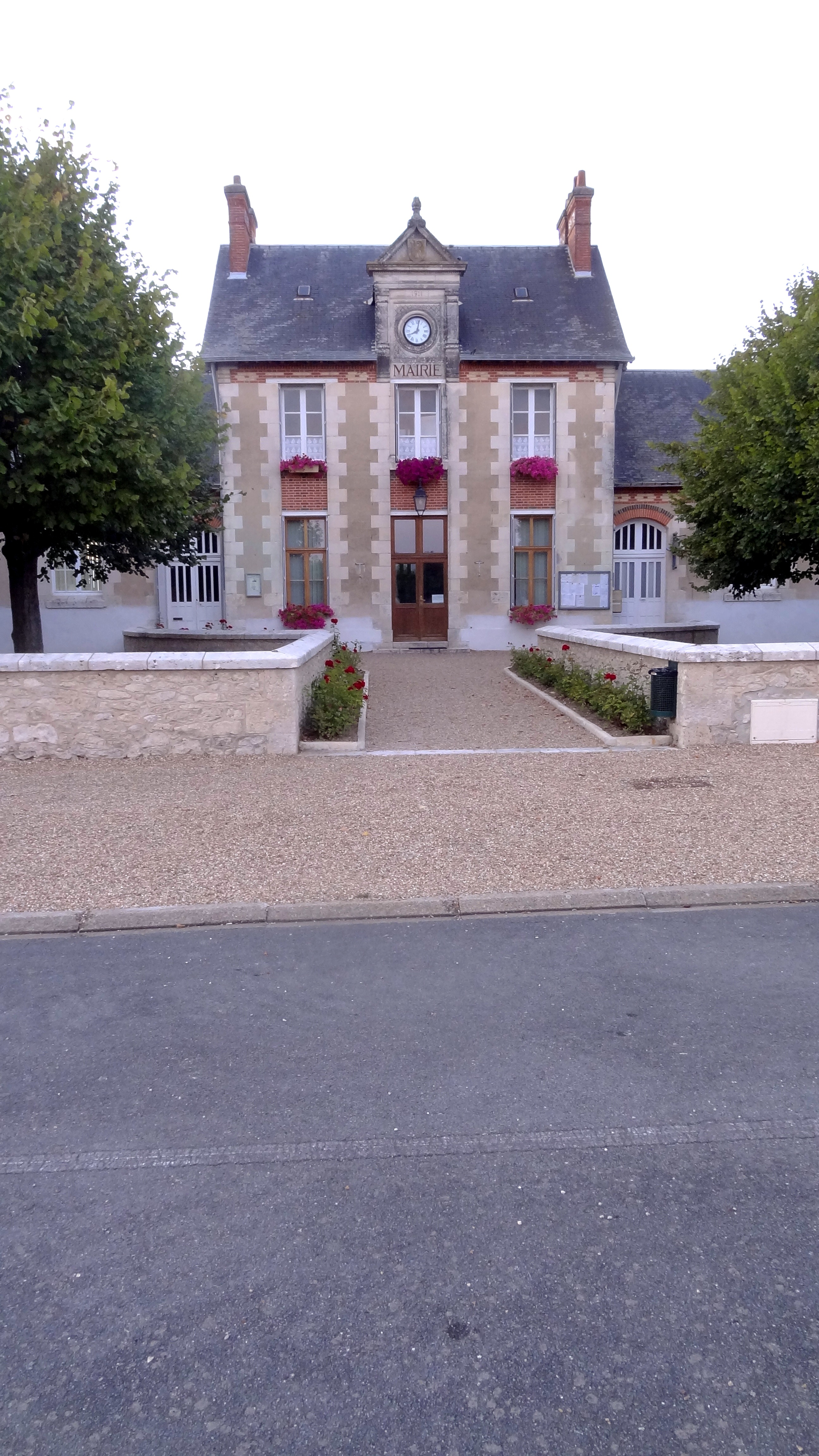 Mairie d'Averdon, Loir-et-Cher, France.